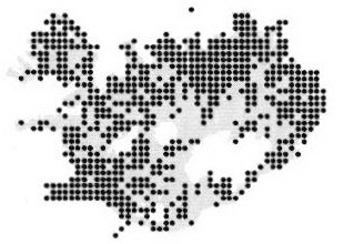 Ареал Salix phylicifolia в Исландии